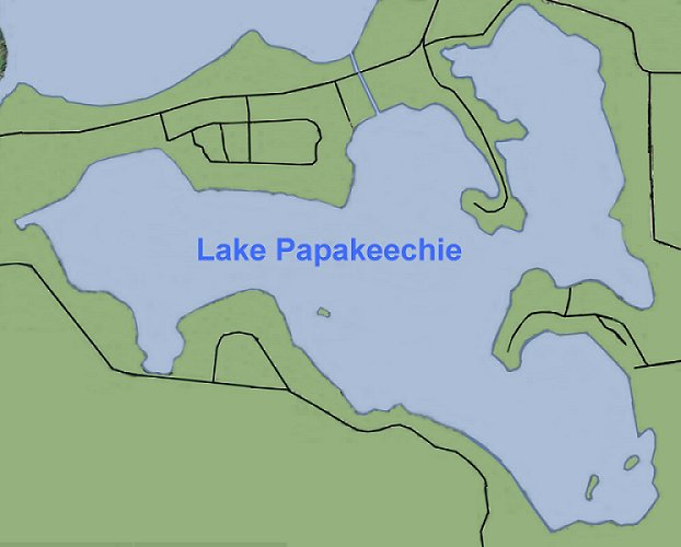 Diagram of Lake Papakeechie